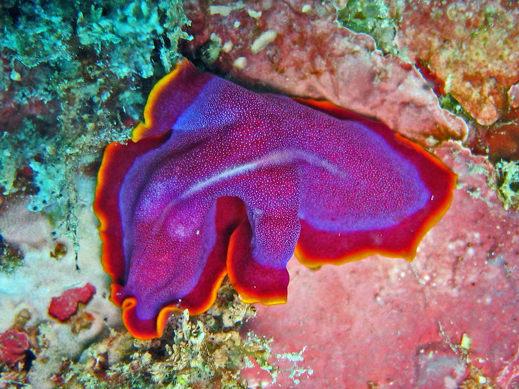 Pseudoceros ferrugineus in Borneo